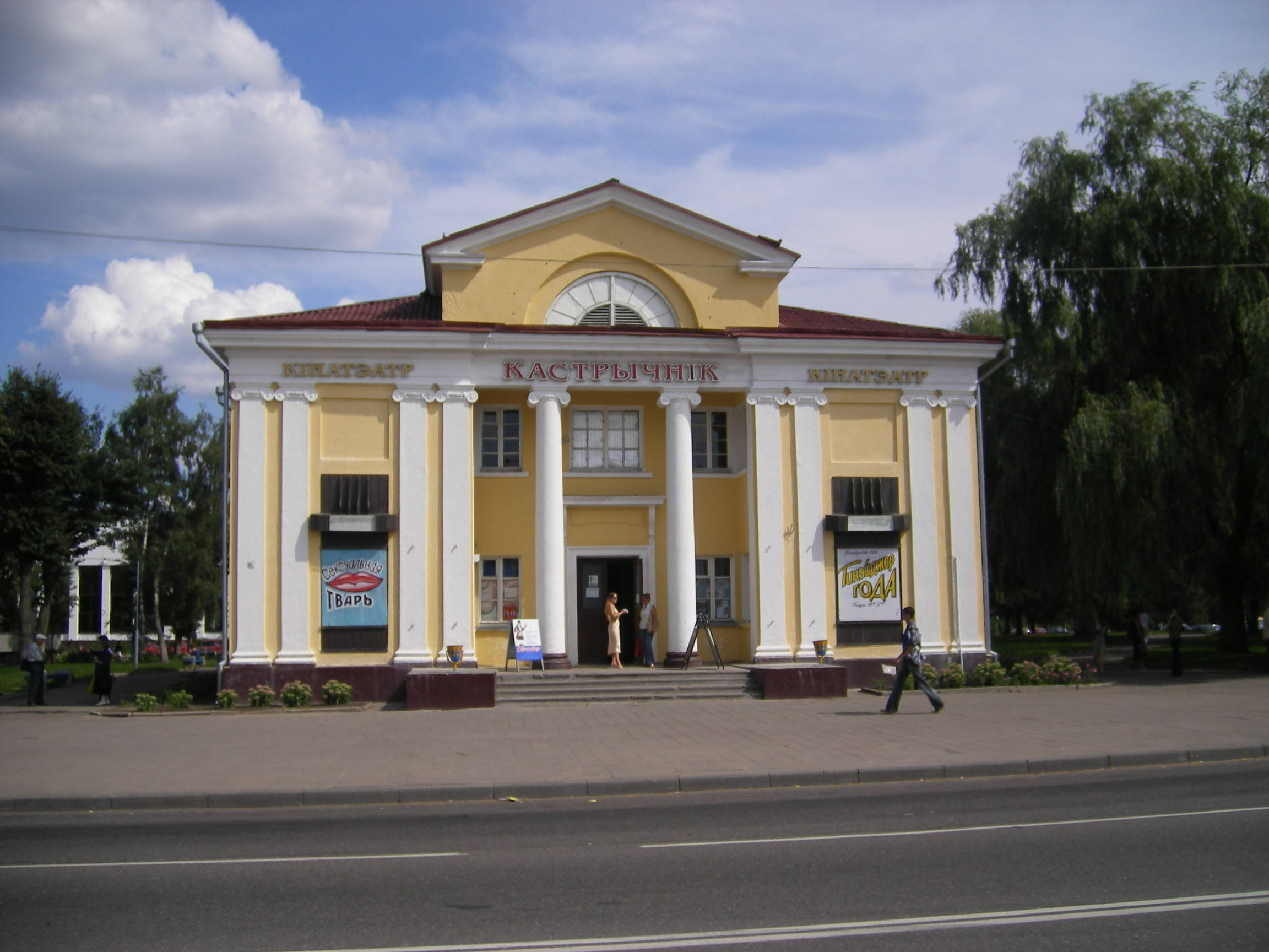 Lida, Kastrychnik kinoteatr